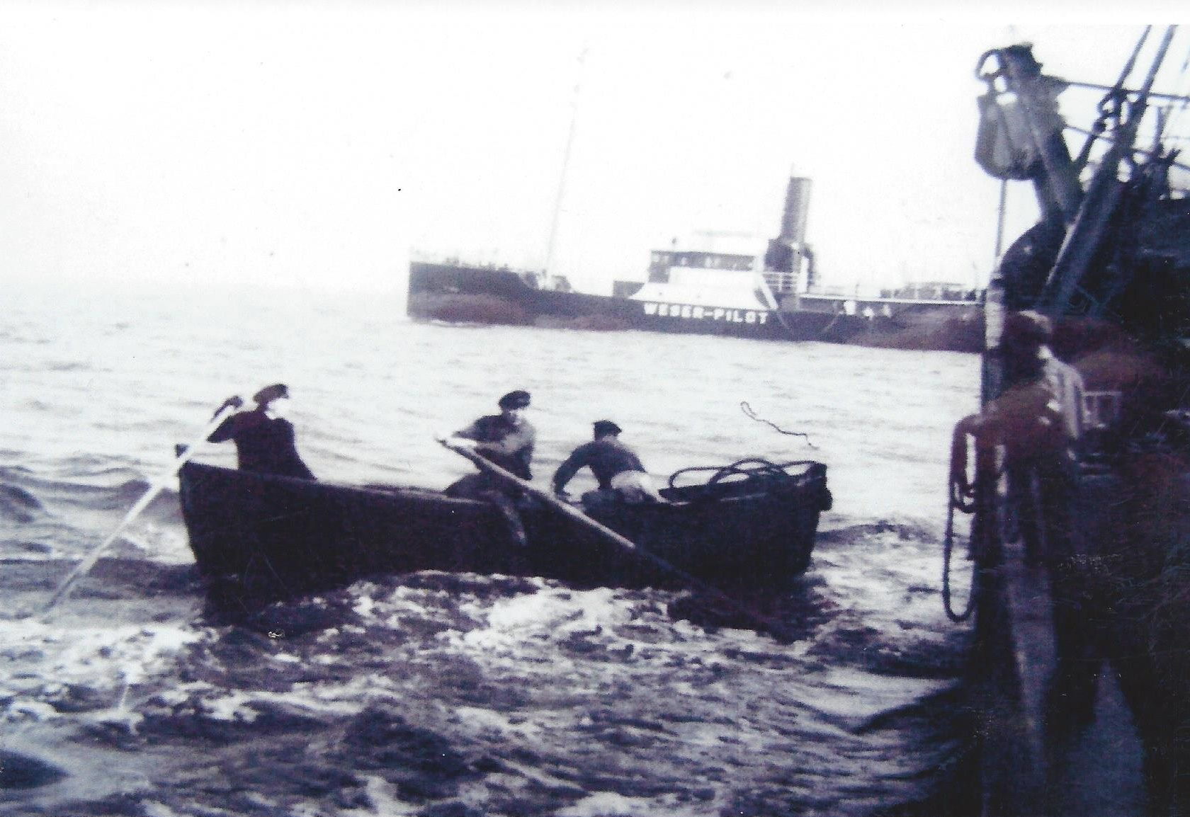 Versetzen eines Lotsens in der Außenweser zum Fischdampfer „Hugo Homann“